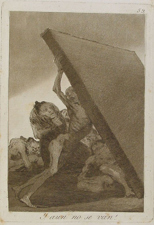 Capricho nº 59: ¡Y aún no se van! de Goya, serie Los Caprichos